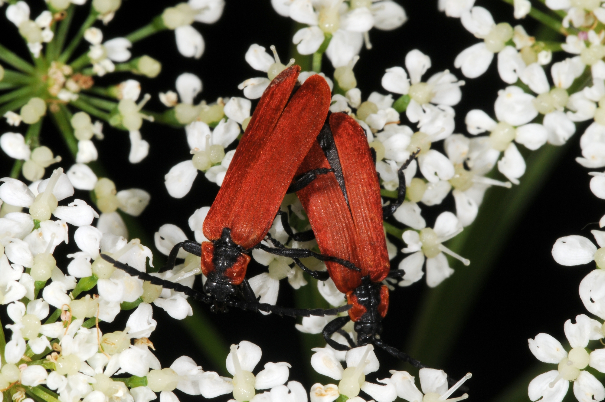 Lycidae: Lygistopterus sanguineus, 10 km östlich Pirna, Sächsische Schweiz, Sachsen, Deutschland